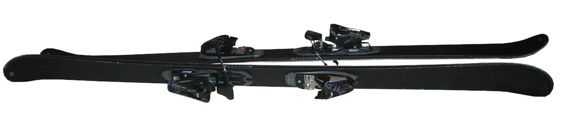 Et par parkski (A pair of twin-tip skies